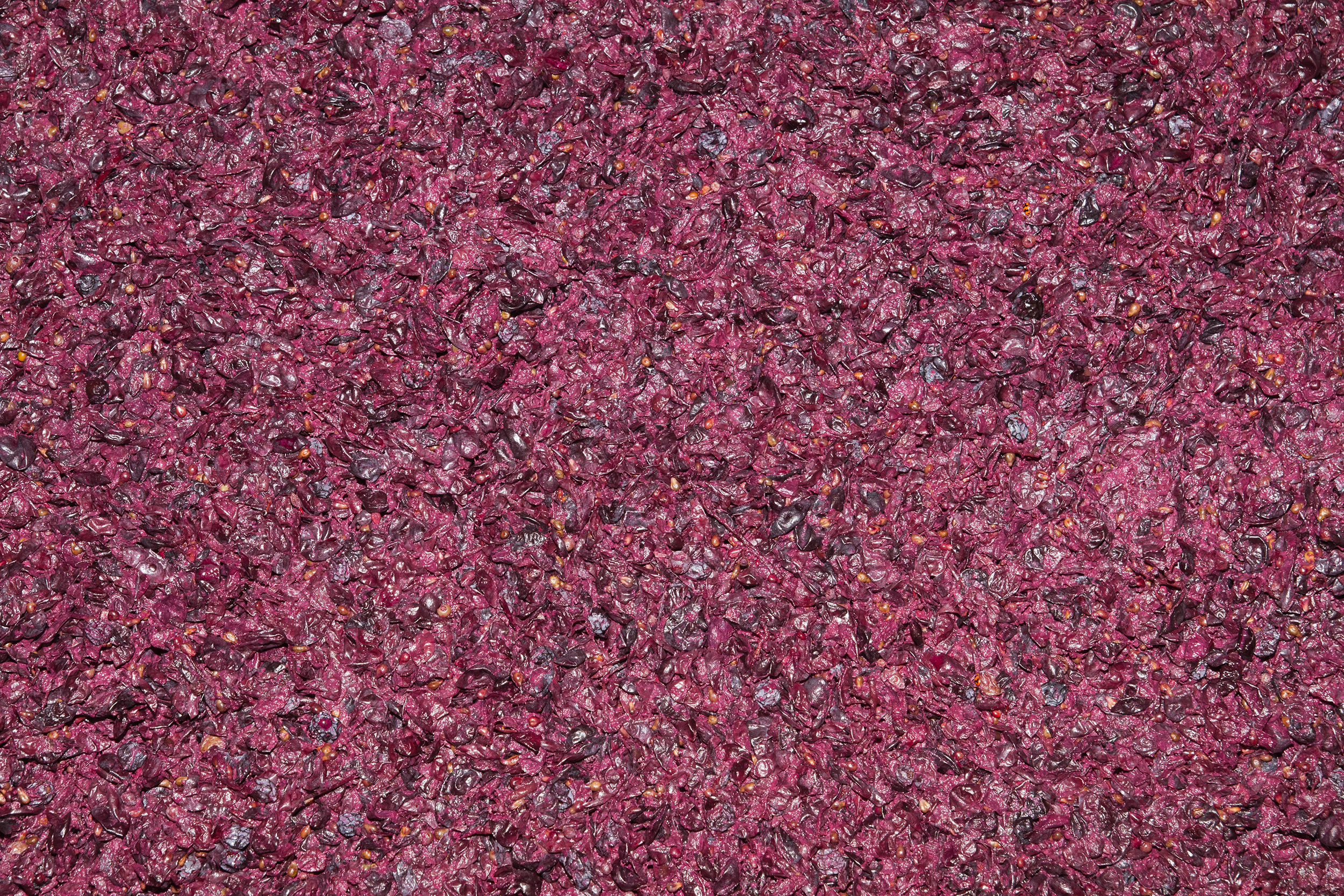 John Kosovich Wines, Baskerville, Western Australia